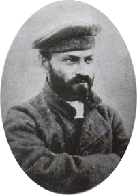 El dirigente socialrevolucionario y fundador de la Organización de Combate, Grigori Gershuni.